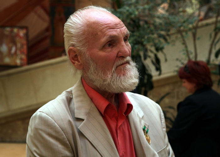 Владимир Крупин